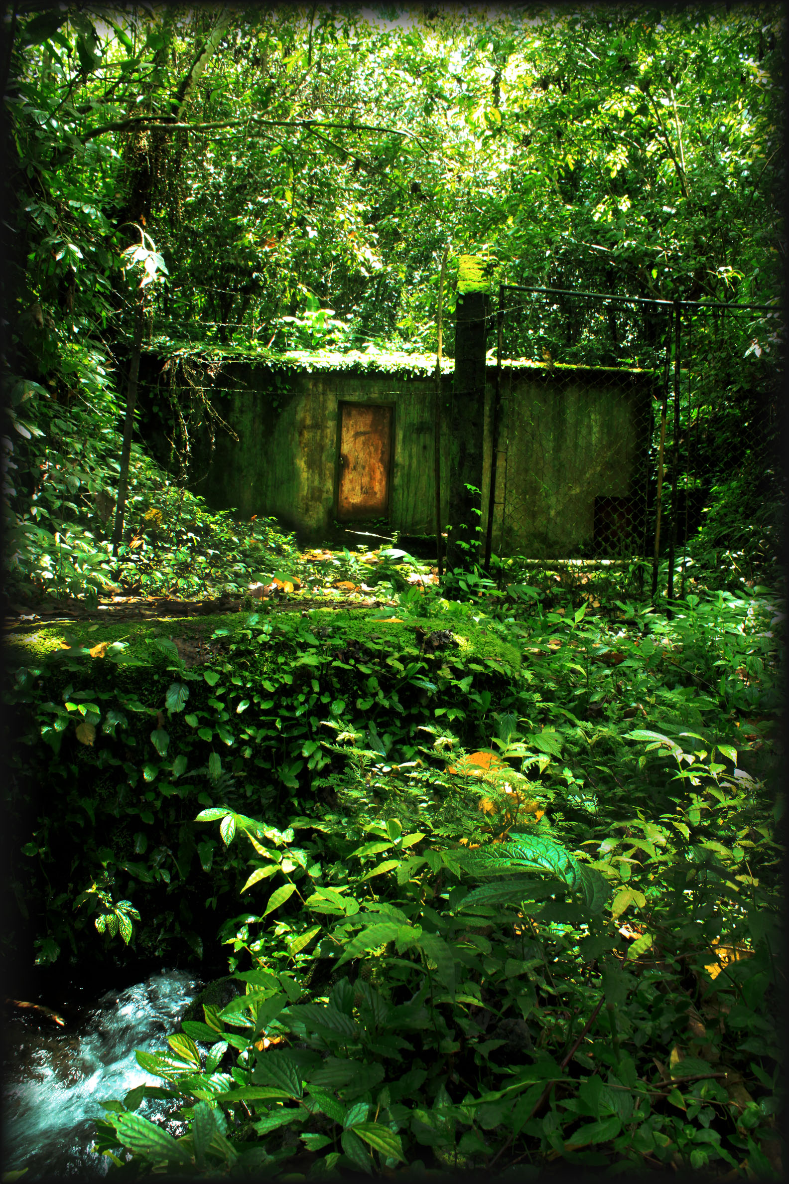 Sumber Mata Air di Desa Warembungan